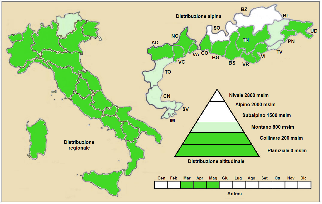 Arum italicum - Distribuzione